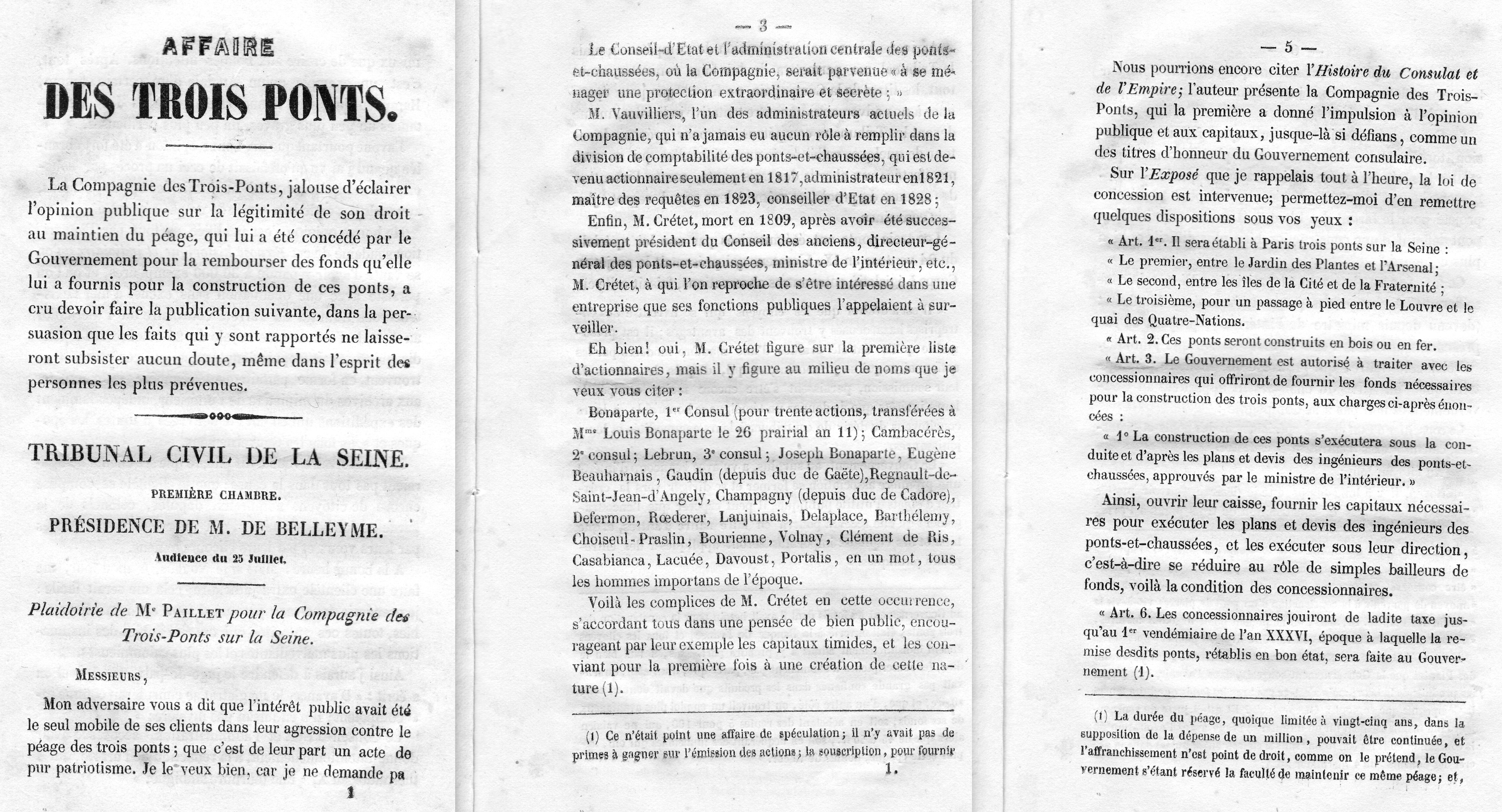 Mémoire en défense de la Compagnie des Trois-Ponts sur la Seine (juillet 1845)